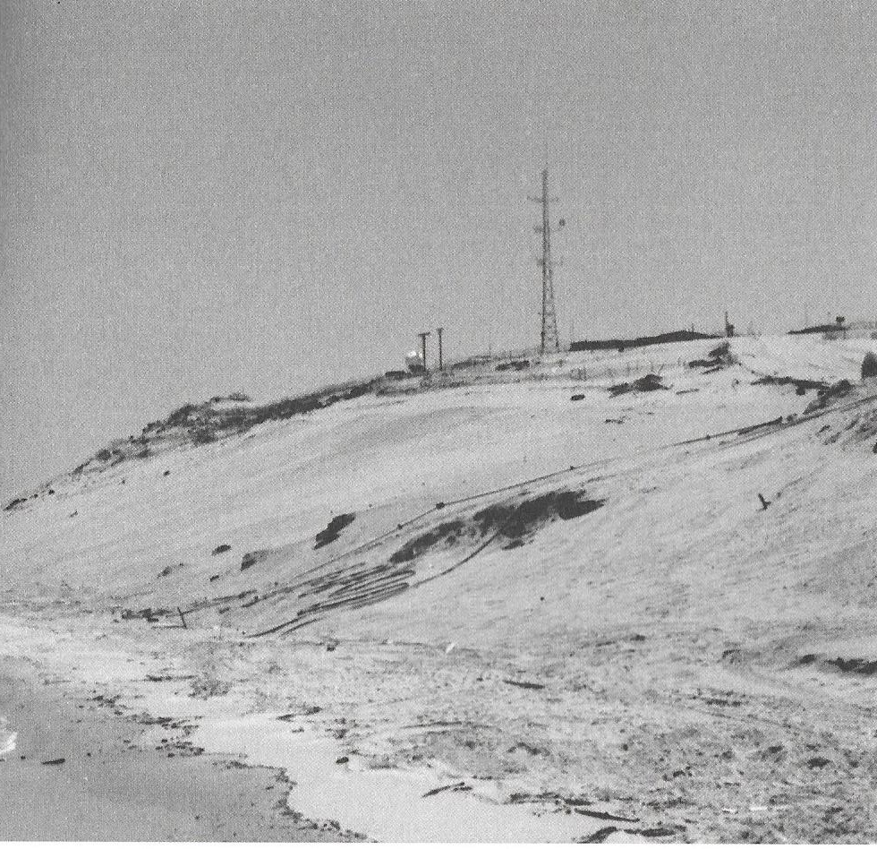 מוצב דפנה במבט מחוף הים